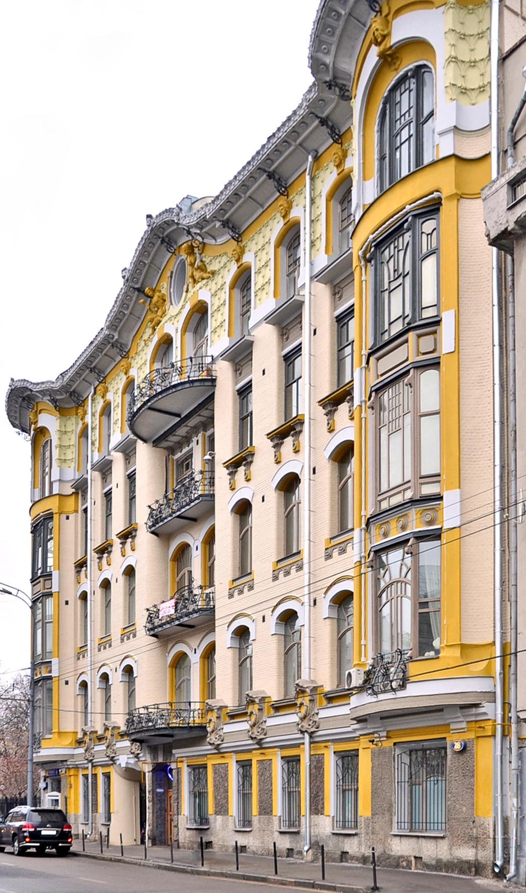 Доходный дом Исакова (1906, архитектор Л. Н. Кекушев), общий вид